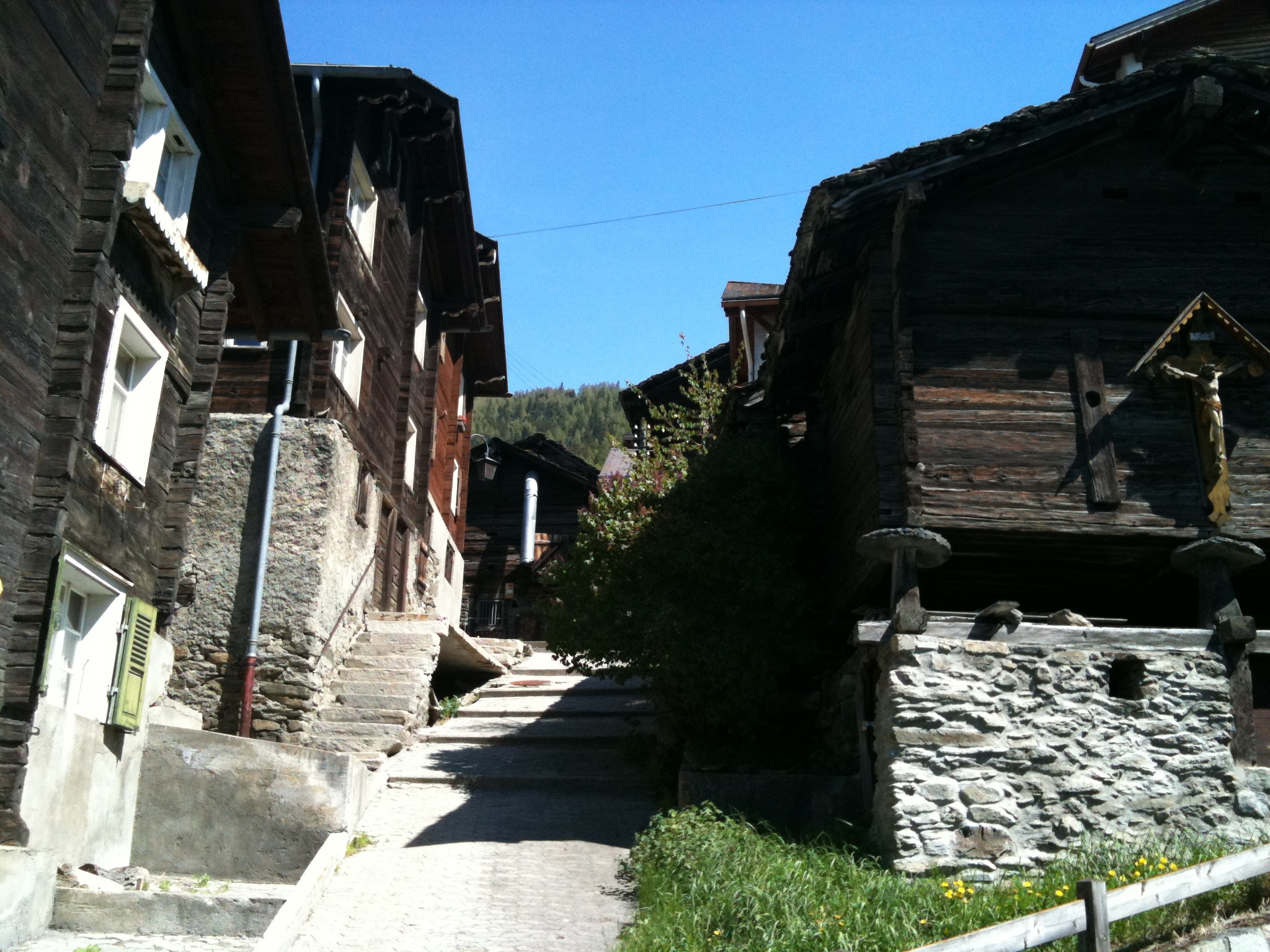 typische Häuserzeile mit alten Stallungen in Visperterminen (Oberwallis)